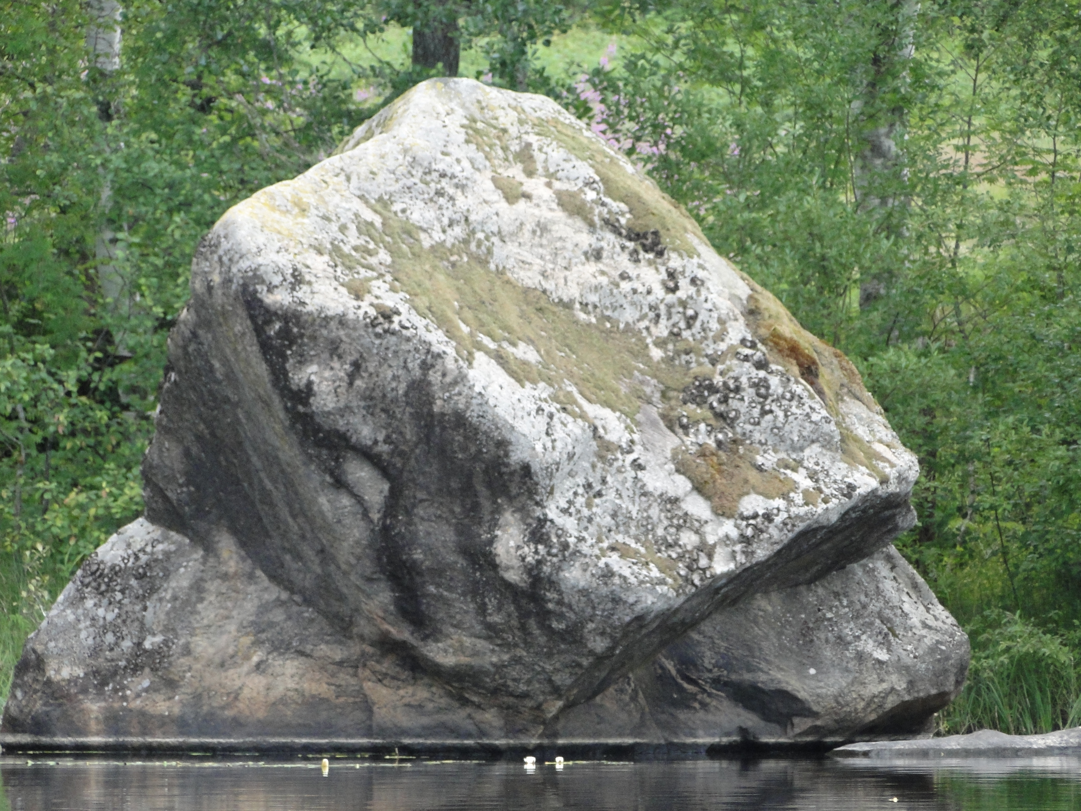 Камень в реке Вуокса напротив Тиверского городища. На камне отметки прежнего уровня воды Вуоксы - две белые полоски - выше нынешней на 1,5 м. В верхней части углубления для крепления настила причала. Камень находится в бухте перед сужением фарватера и уменьшением глубины. Непосредственно за ним на берегу ровное поле со следами построек.